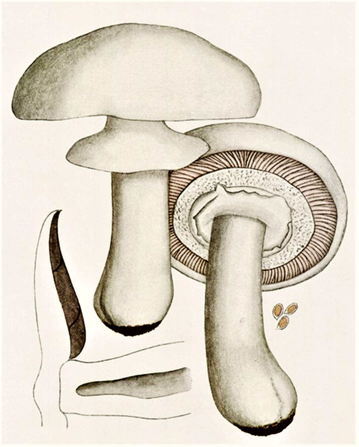 Giacomo Bresadola: Psalliota arvensis Schaeff., 1774) Gillet (1874), heute Agaricus arvensis Schaeff. (1774)